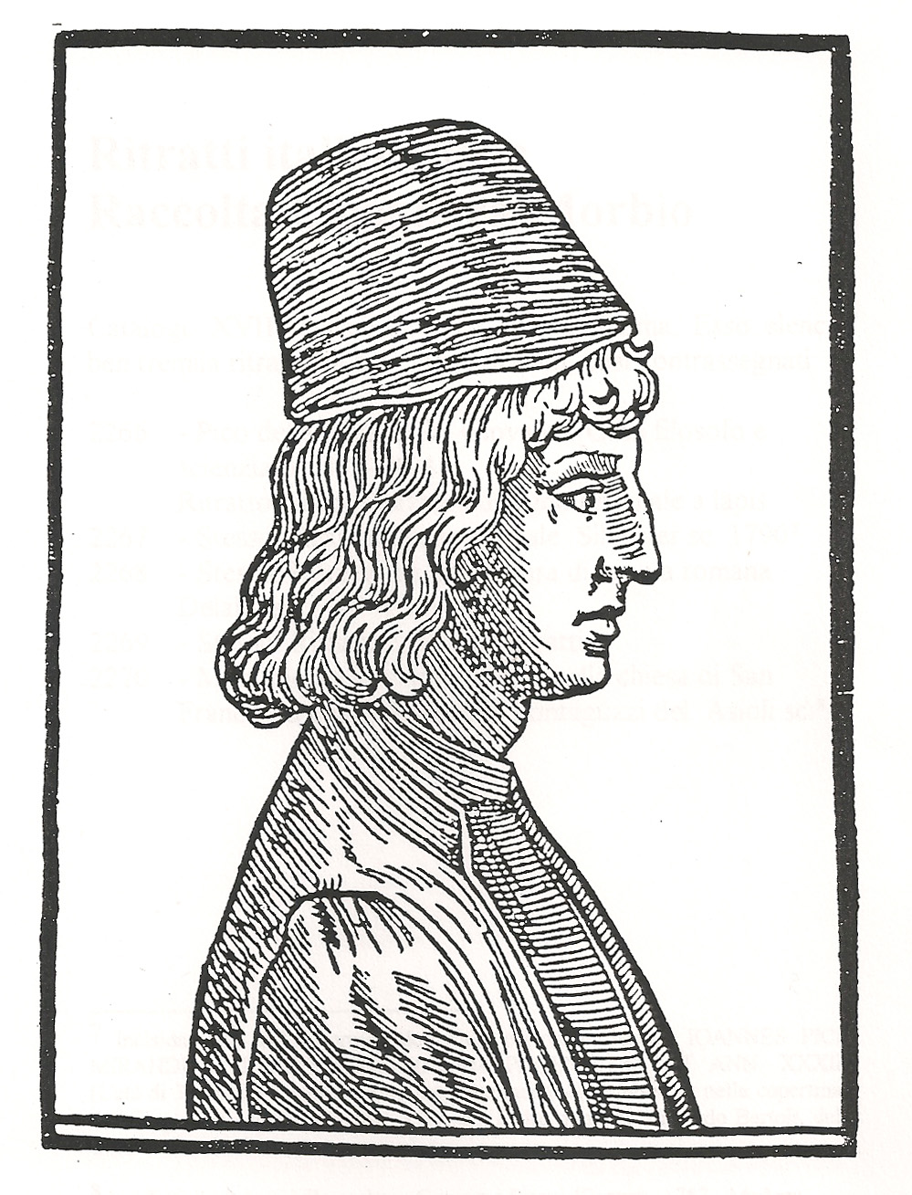 Ignoto del XVII sec. Ritratto di Pico della Mirandola; xilografia dal libro "Della celestiale fisionomia", Padova 1616.